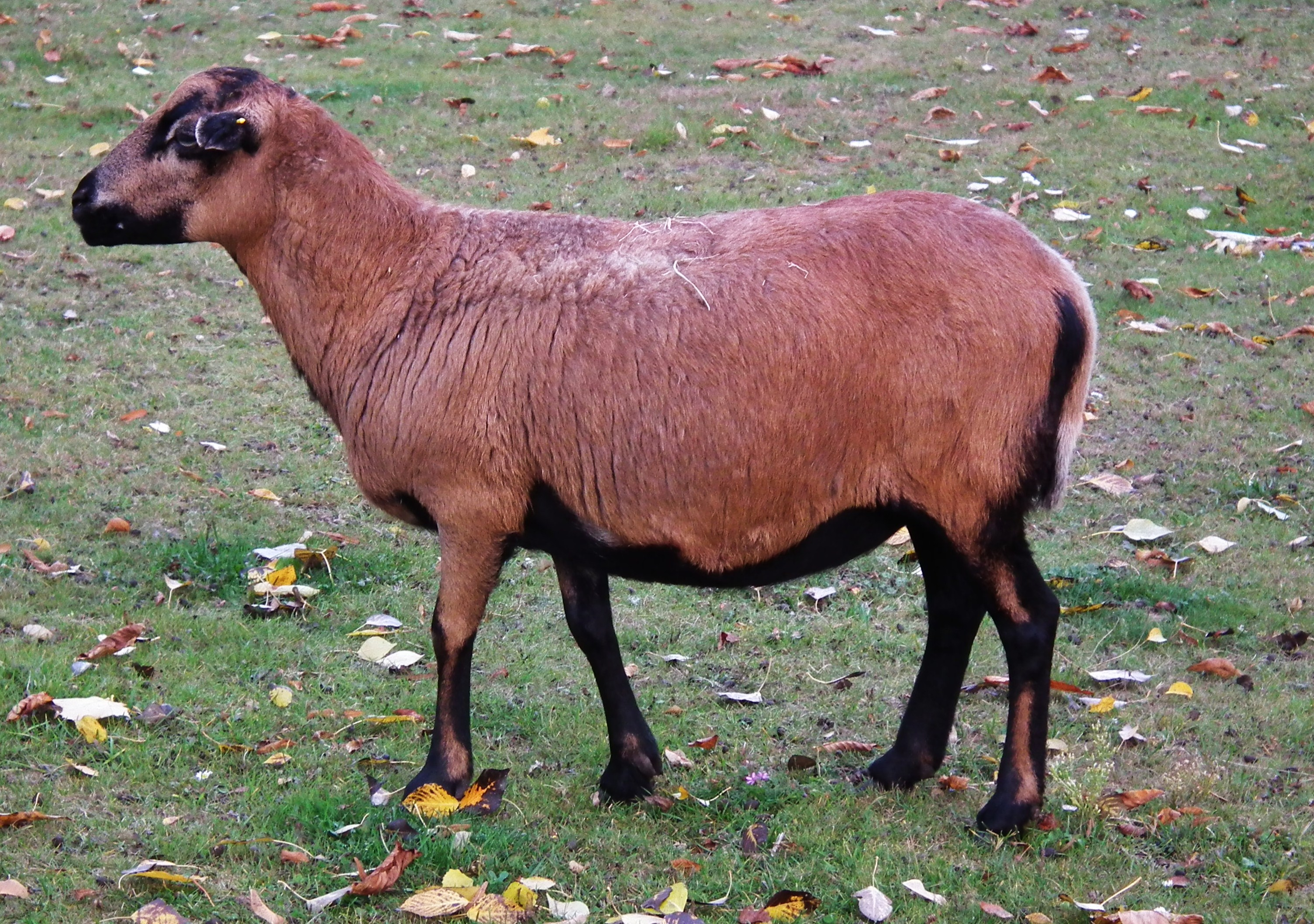 Owca kameruńska w poznańskim Starym ZOO.